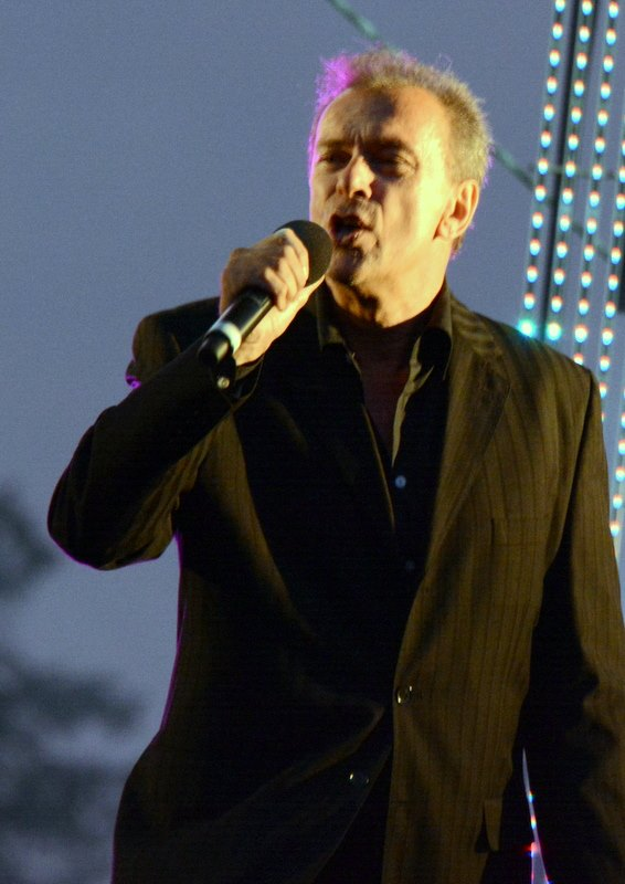 Richard Sanderson au concert "La Folie des années 80" à Enghien-les-Bains